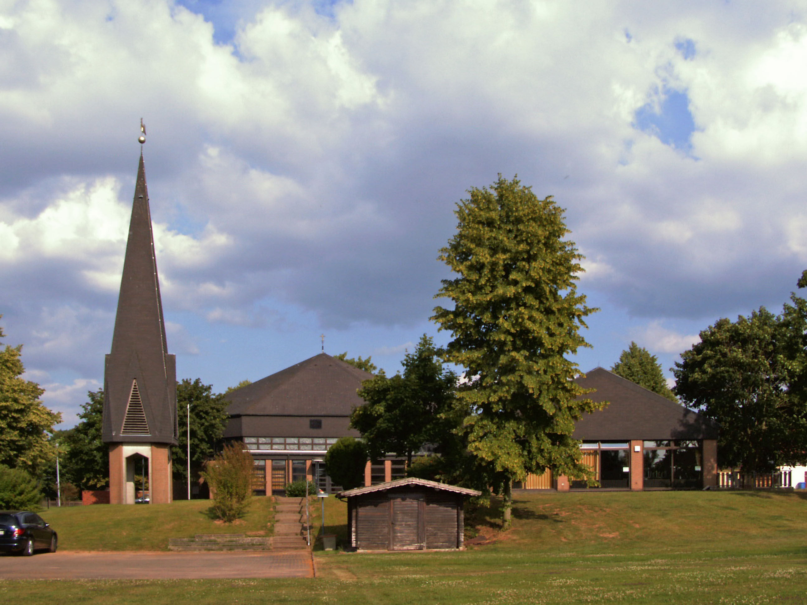 Katholische Kirche St. Nikolaus in Tiftlingerode, Ortsteil von Duderstadt